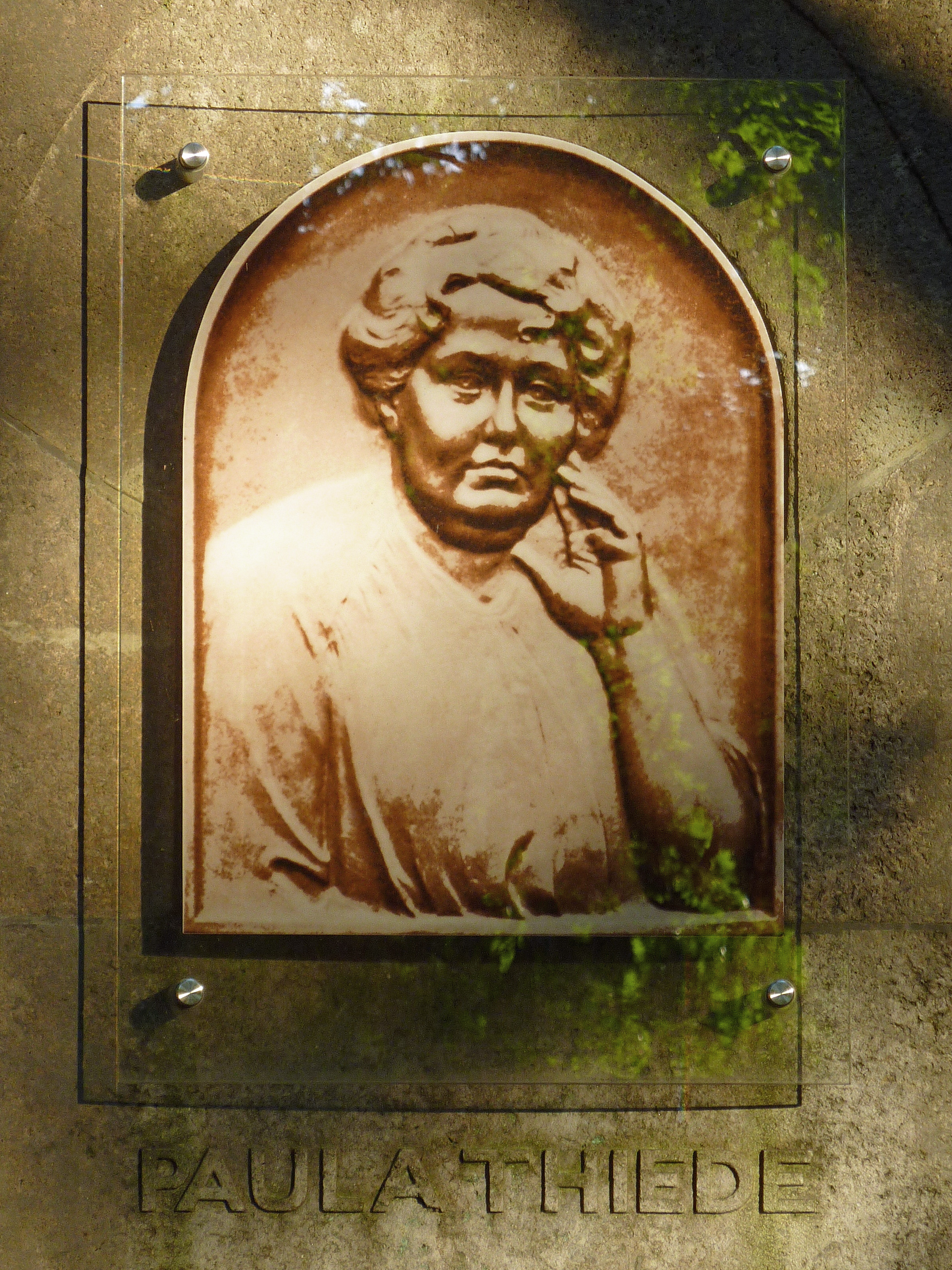 Gläserne Porträttafel am Grabmal für Paula Thiede auf dem Zentralfriedhof Friedrichsfelde in Berlin-Lichtenberg. Geschaffen von Erika Klagge nach einer fotografischen Vorlage des gestolenen Bronzereliefs. Eingeweiht am 6. März 2007.